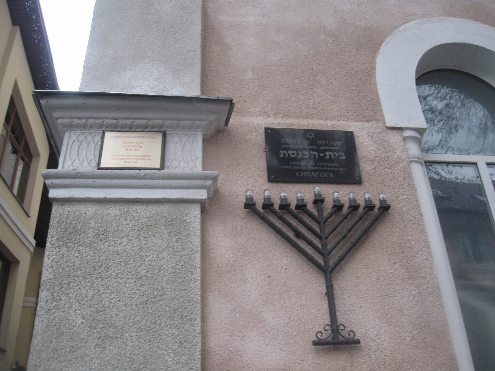 Темпель єврейський у Станиславові Темпель, Івано-Франківськ, Вулиця Страчених Націоналістів, 7